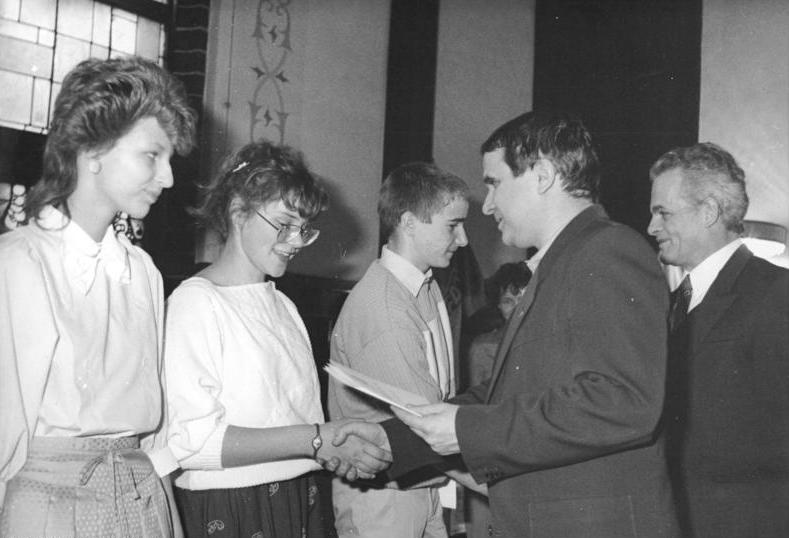 Berlin, Jugendweihe, Eberhard Aurich ADN-ZB Senft 23.3.86-erd-Berlin: Jugendweihefeiern. Für 11.800 Jungen und Mädchen der DDR fanden festliche Veranstaltungen zur Jugendweihe statt. Im Abgeordnetensaal des Köpenicker Rathauses gratulierte Eberhard Aurich, 1. Sekretär des Zentralrates der FDJ, Schülern der 8. Klasse der Gerhart-Hauptmann-Oberschule zu diesem bedeutenden Ereignis.